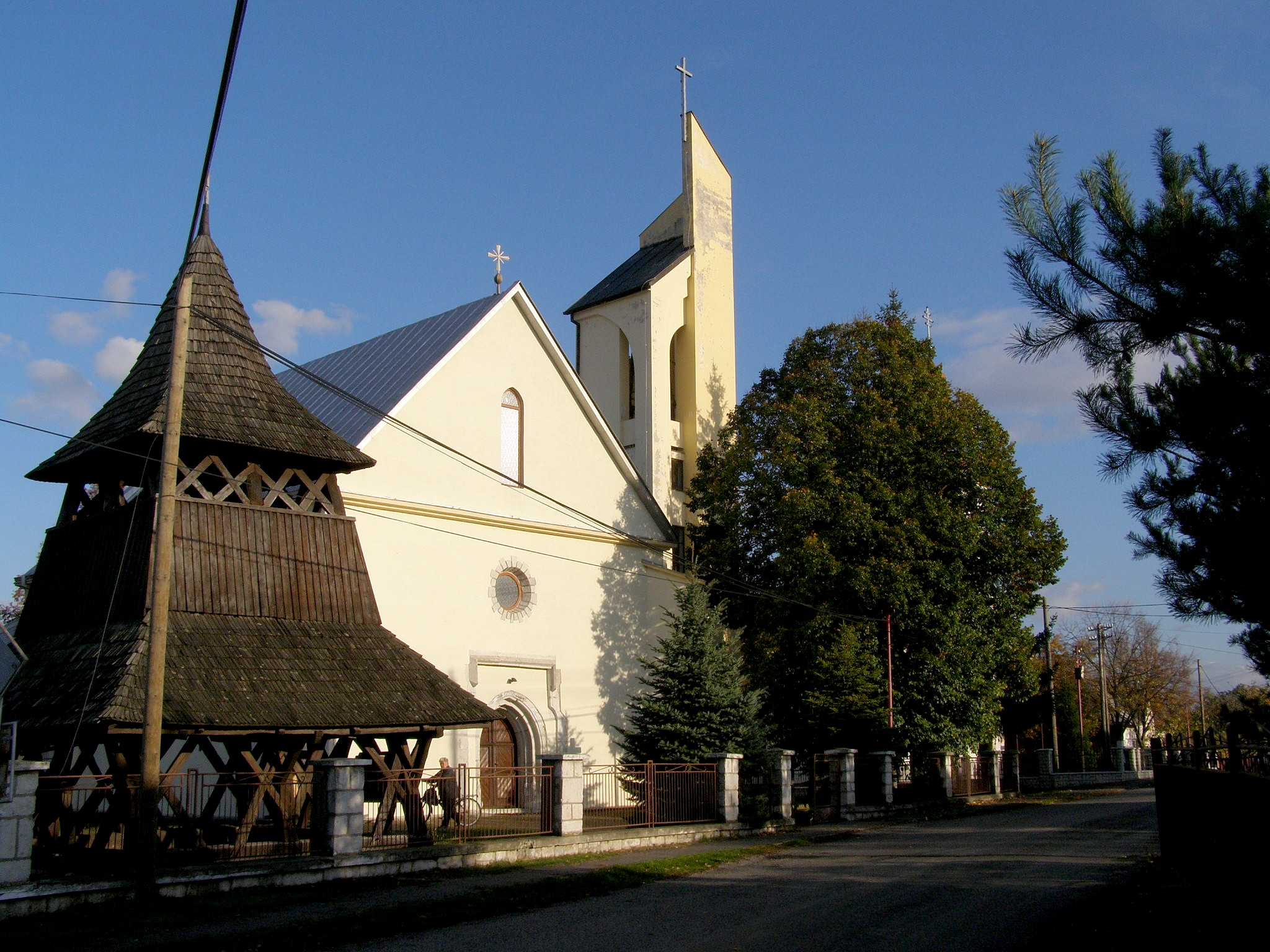 Malé Ozorovce - časť obce s drevenou zvonicou a Kostolom svätej Márie Magdalény